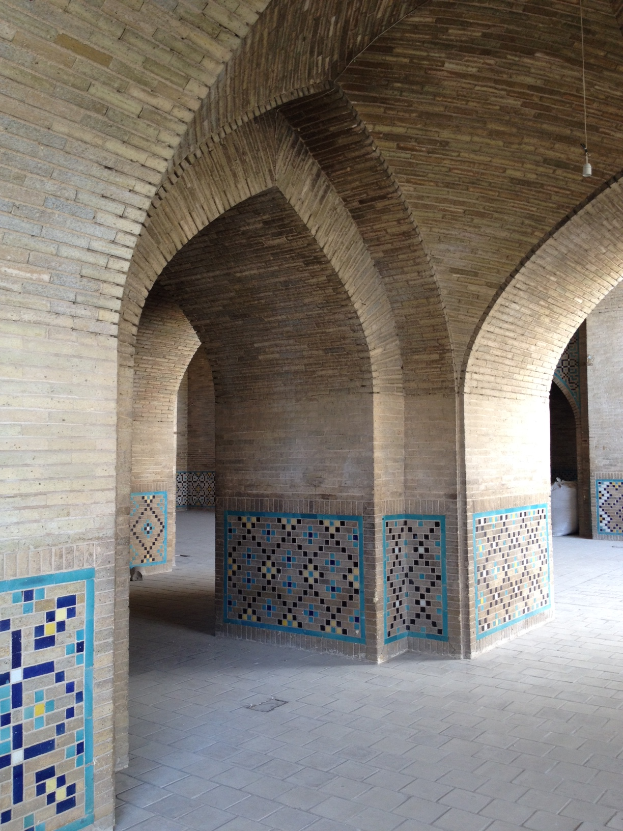 مسجد حکیم